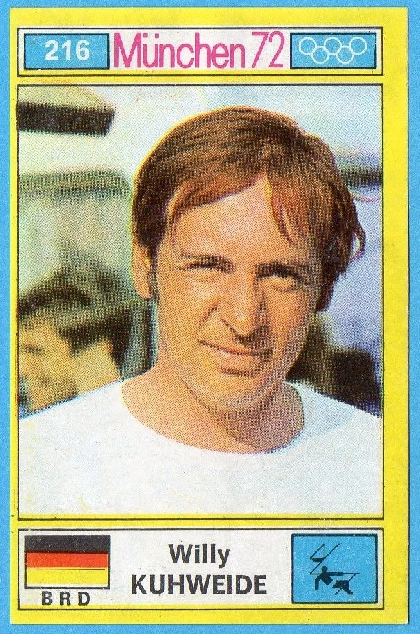 MUNCHEN/MONACO '72-PANINI-Figurina n.216- KUHWEIDE - BRD -VELA-Rec